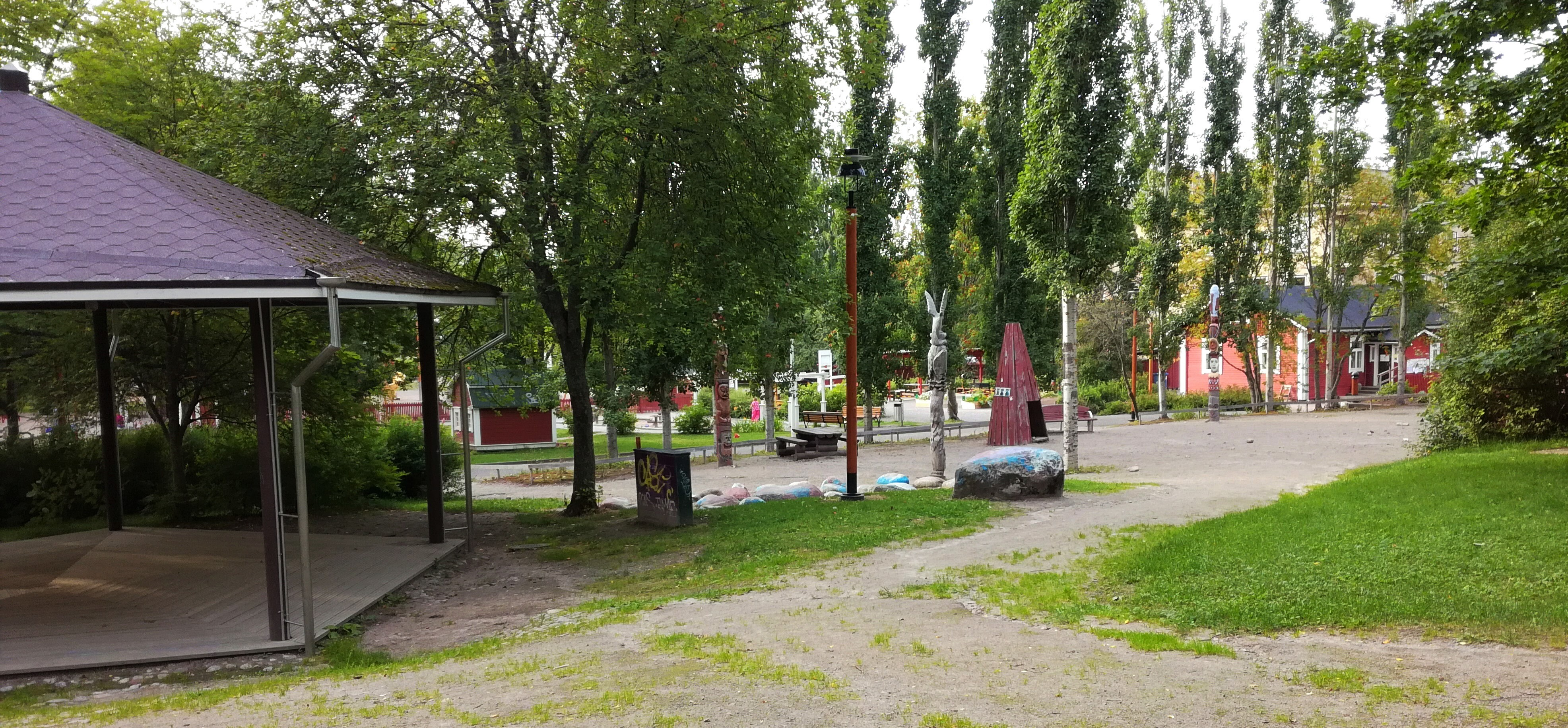 Mäki-Matin perhepuisto Jyväskylässä.